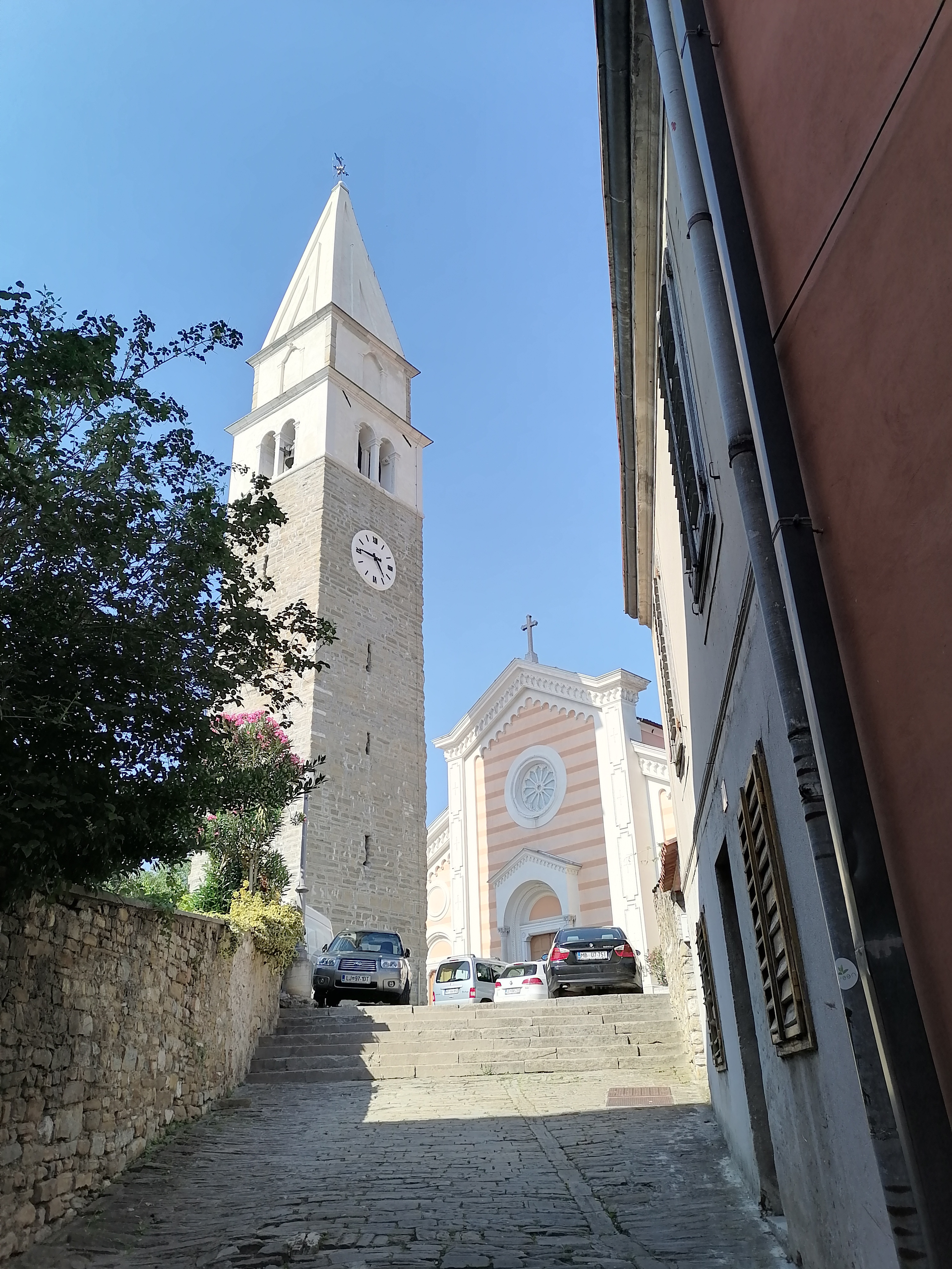 Cerkev sv. Mavra